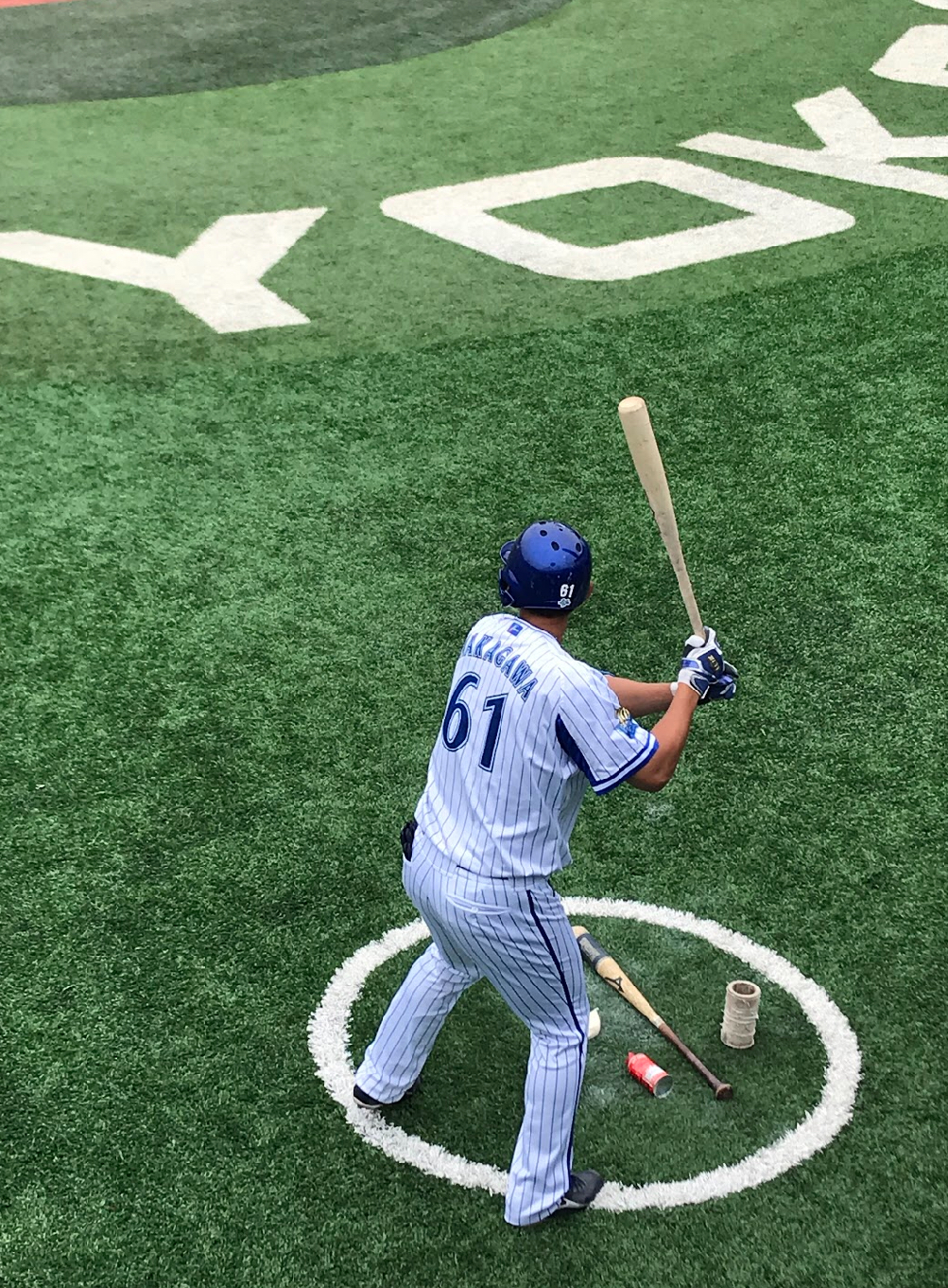 ネクストバッターズサークルで素振りをする中川大志選手(横須賀スタジアム)